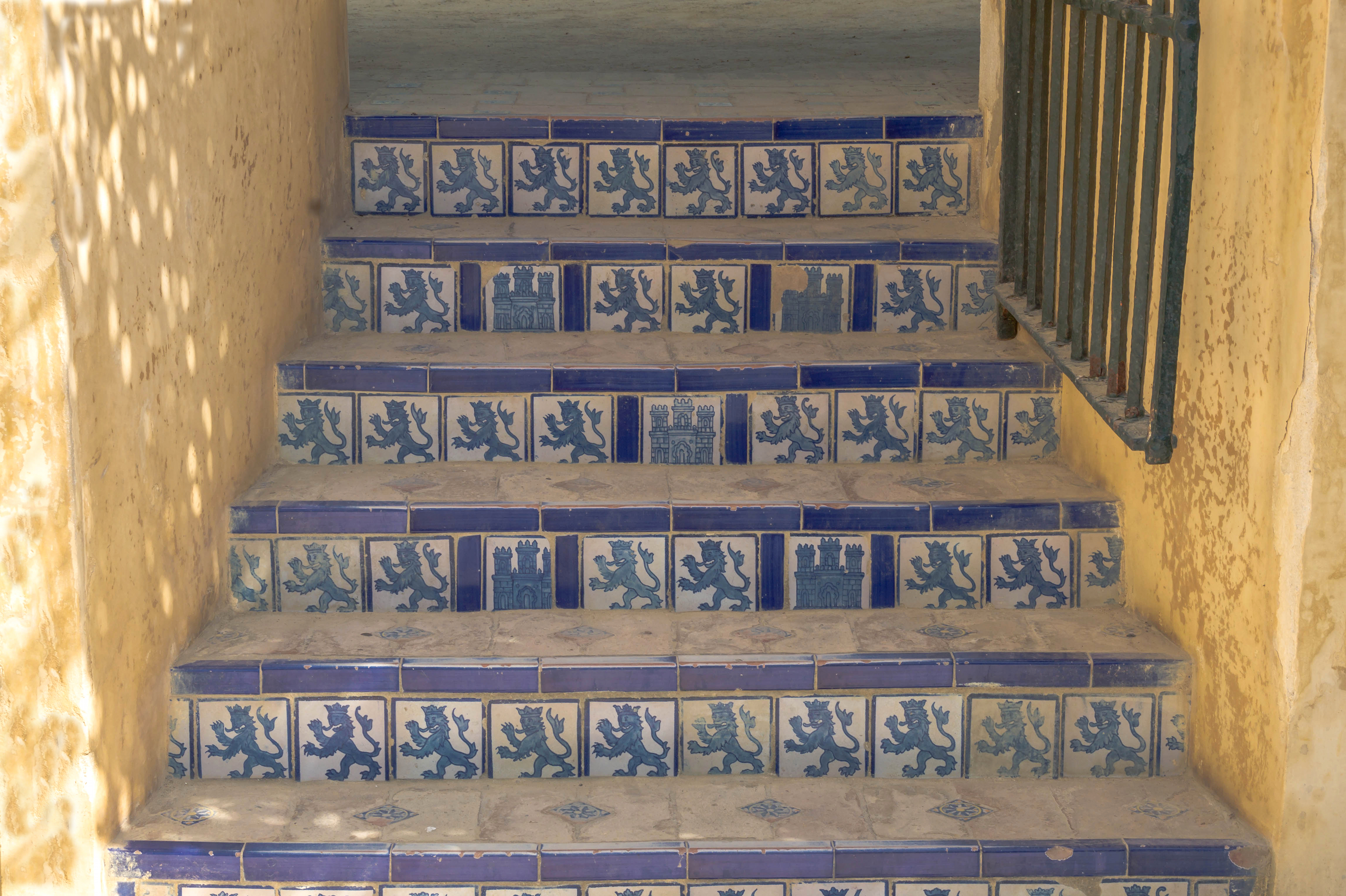 Contremarches d'un escalier dans les jardins de l'Alcazar royal, orné de carreaux de faïence montrant les lions héraldiques du Leon et les châteaux de Castille.